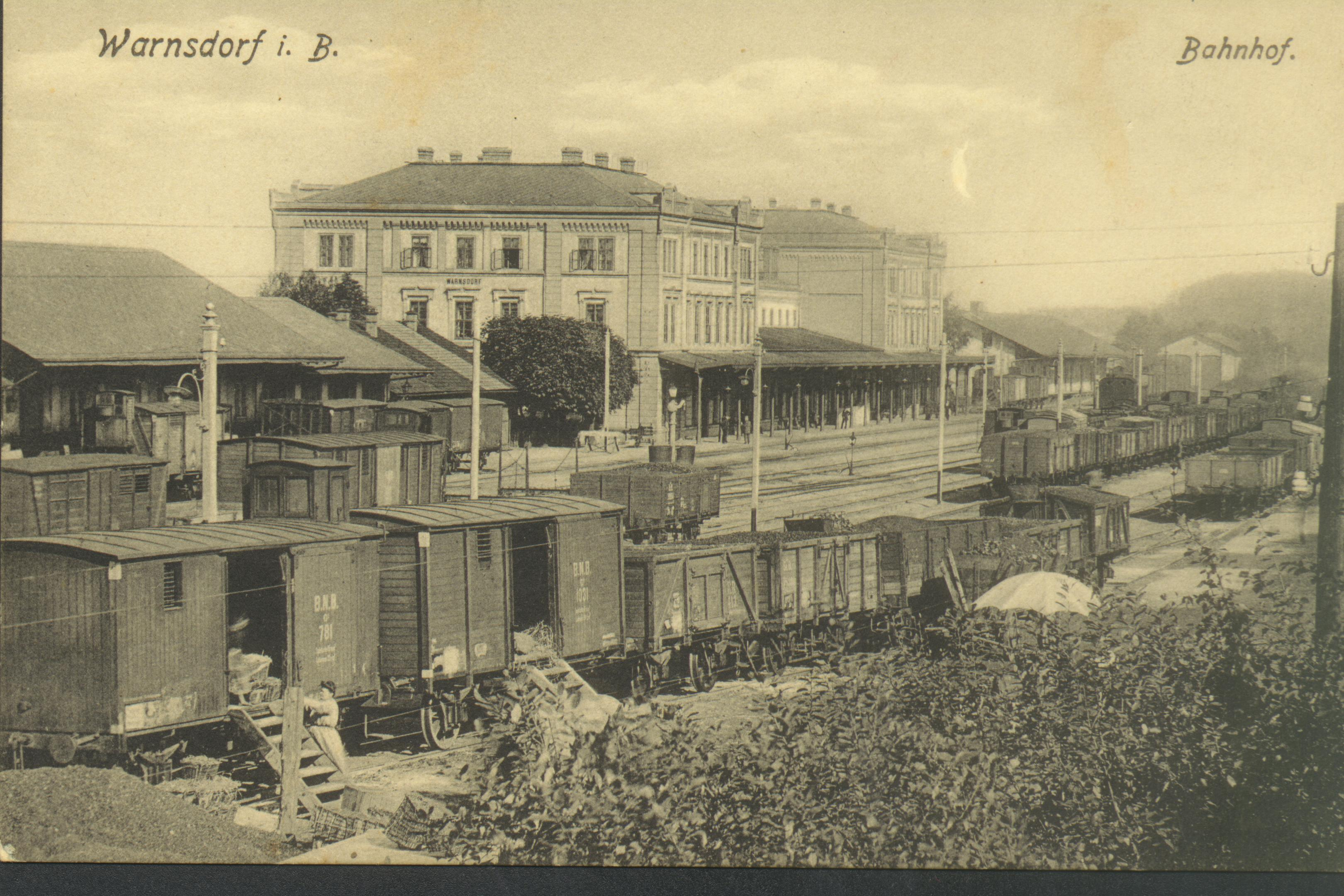 Varnsdorf nádraží, vagóny České severní dráhy